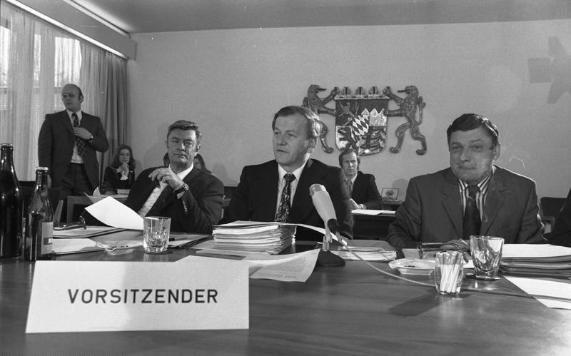 Innenministerkonferenz der Länder in der Bayerischen Landesvertretung. (Die Vorsitzenden der Ständigen Konferenz der innenminister der Länder. Von links: Stellvertretender Vorsitzender Innenminister Weyer (Nordrhein-Westfalen), Vorsitzender Innenminister Heinz Schwarz (Rheinland-Pfalz), stellvertretender Vorsitzender Bürgermeister Neubauer (Berlin))